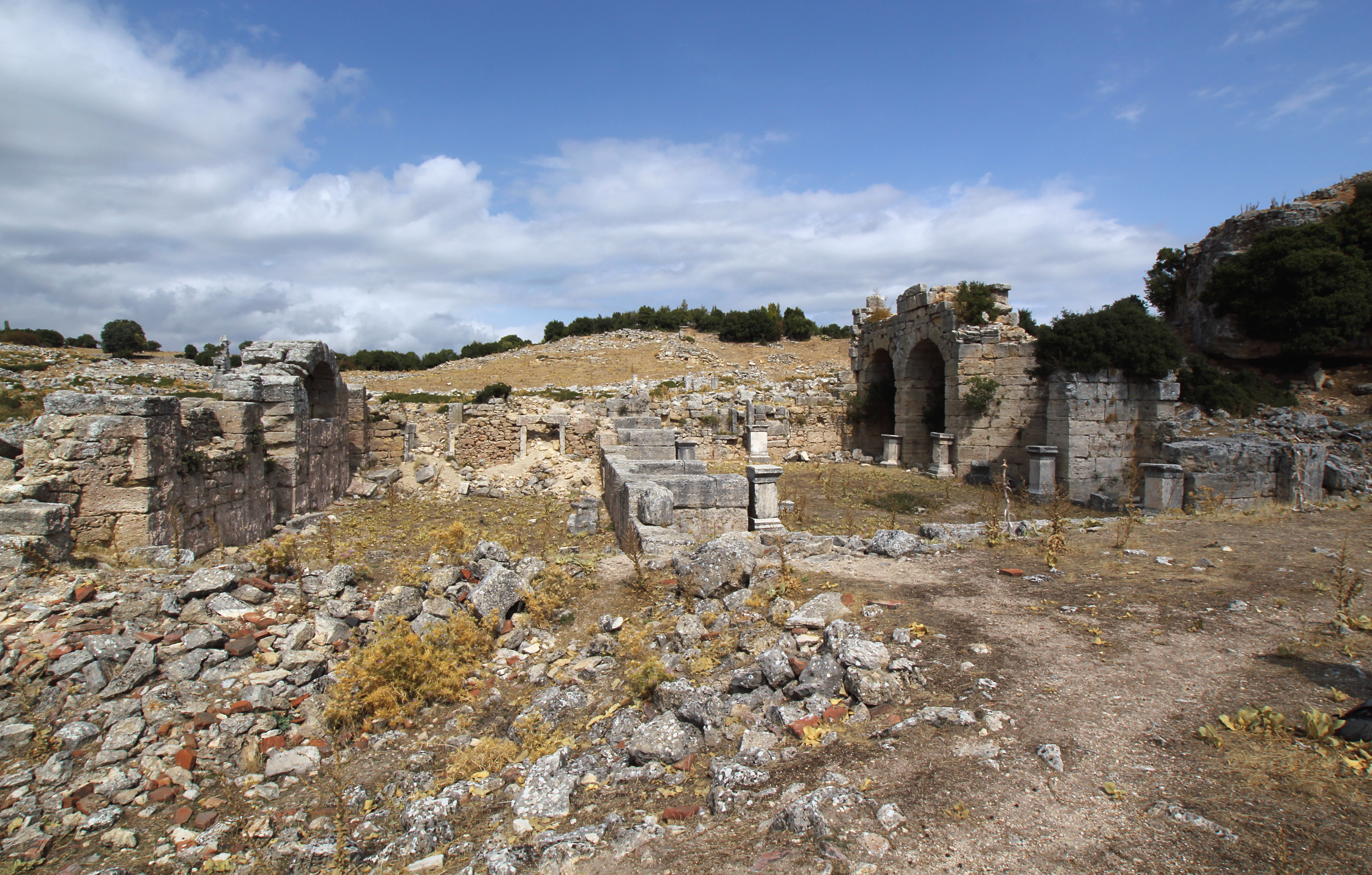 Kremna, antike Stadt in Pisidien, Südtürkei, Bibliothek/Bad